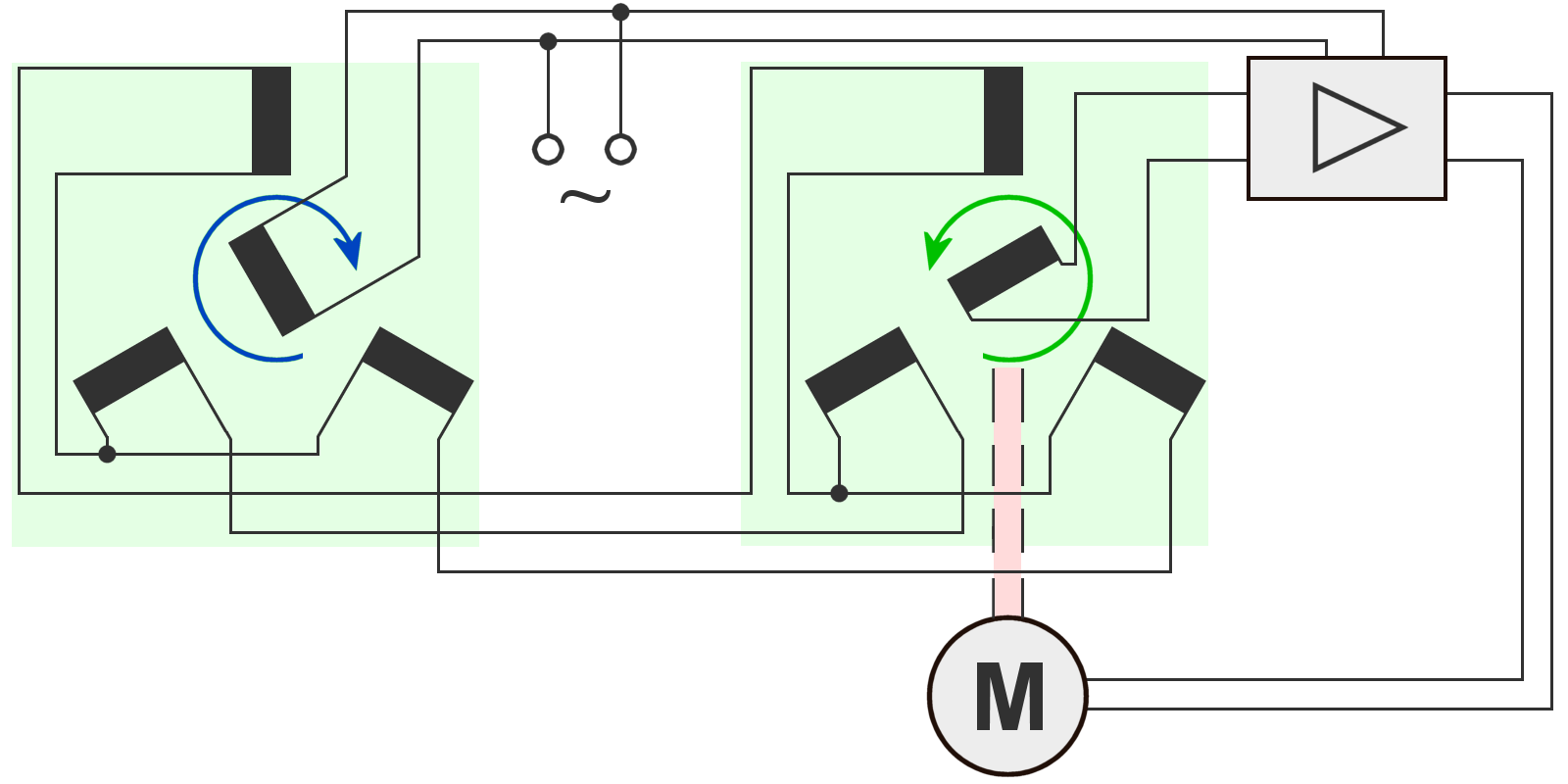 Drehmeldesystem in Servoschaltung: Ein Drehmeldegeber erzeugt das Wechselfeld, welches zum Drehmeldeempfänger übertragen wird. Statt der angelegten Stützspannung wird an der Rotorwicklung eine Fehlerspannung abgegriffen. Diese wird verstärkt und einem Servomotor zugeführt. Dieser regelt das System kräftig in den Winkel, welcher die geringste Fehlerspannung erzeugt.